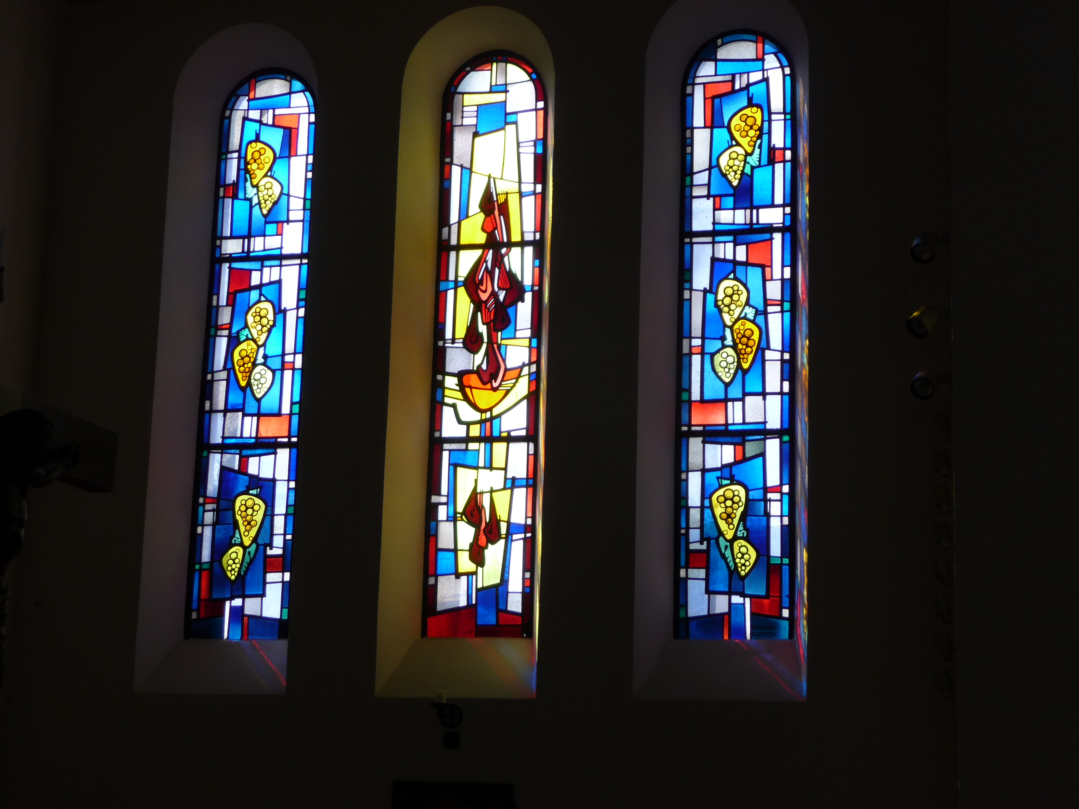 rechte Fensterseite im Altarraum der St. Patrokli Kirche in Dortmund-Kirchhörde